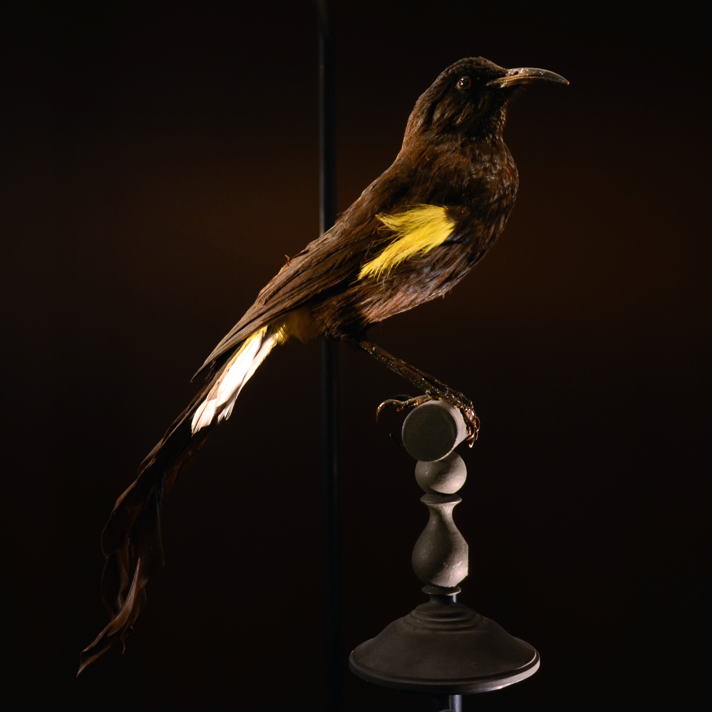 Moho d'Hawaii ( Moho nobilis ), espèce éteinte. Specimen naturalisé exposé au Museum National d'Histoire Naturelle à Paris, dans la Grande Galerie de l'Evolution.